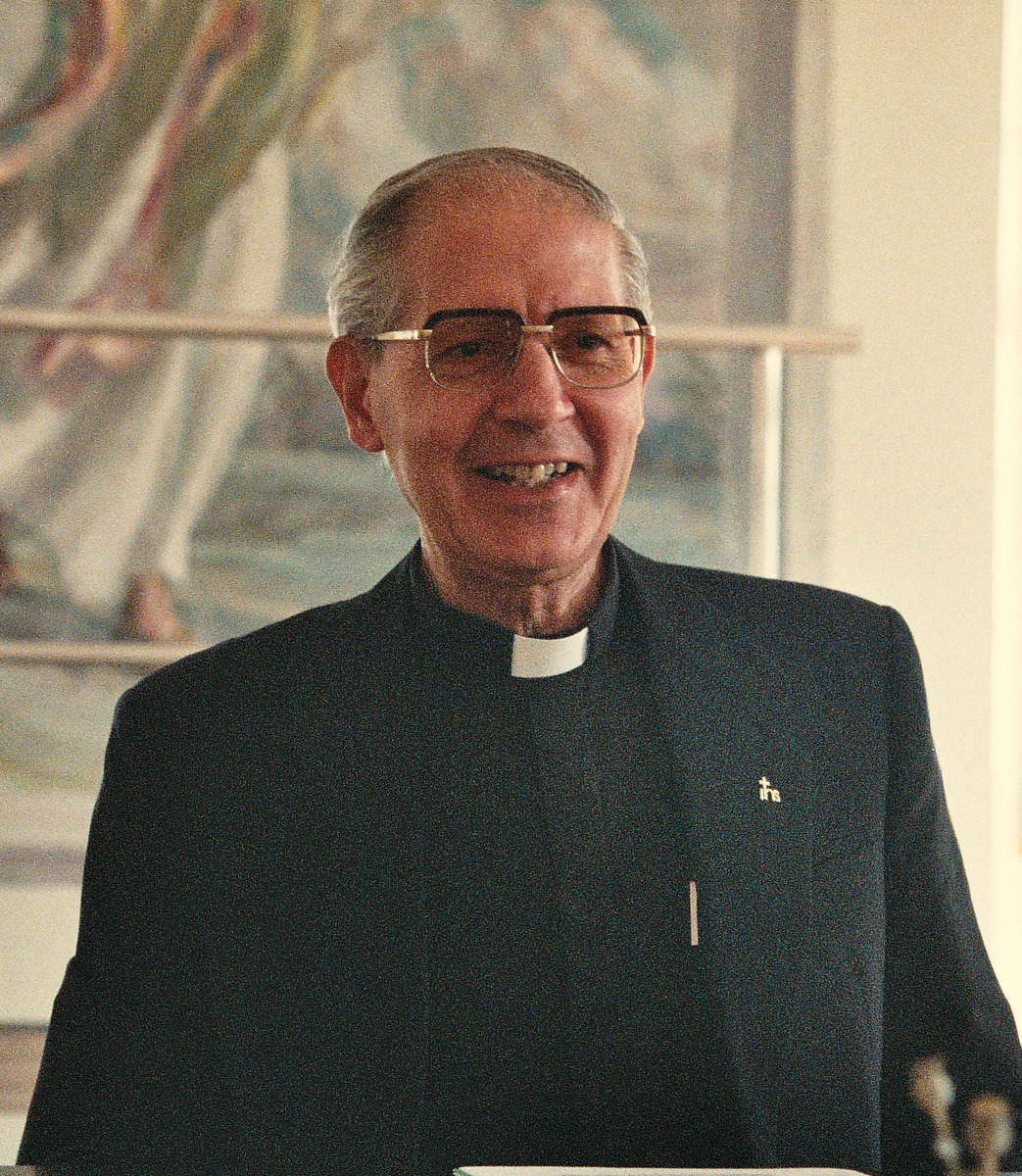 Adolfo Nicolás, Jesuiitide Seltsi kindral, ehk must paavst. 2008. aasta augustis Vilniuses mitteametlikul visiidil. Pressikonverents.